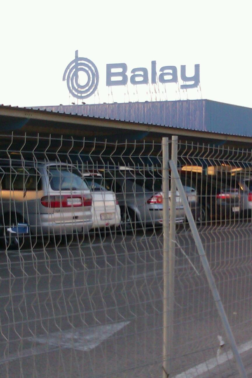 Aragonés: Fabrica de Balay en Zaragoza